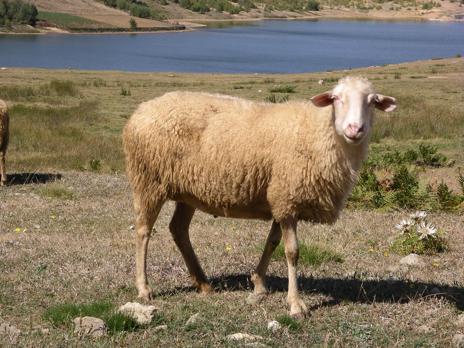 Delja rude qe mbarshtohet ne Zonen e Topojanit